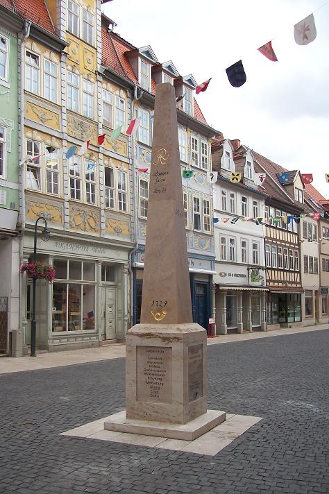 Kursächsische Ganzmeilensäule Bad Langensalza